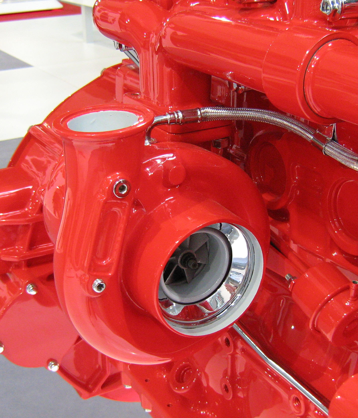 Turbolader am ausgebauten LKW-Motor